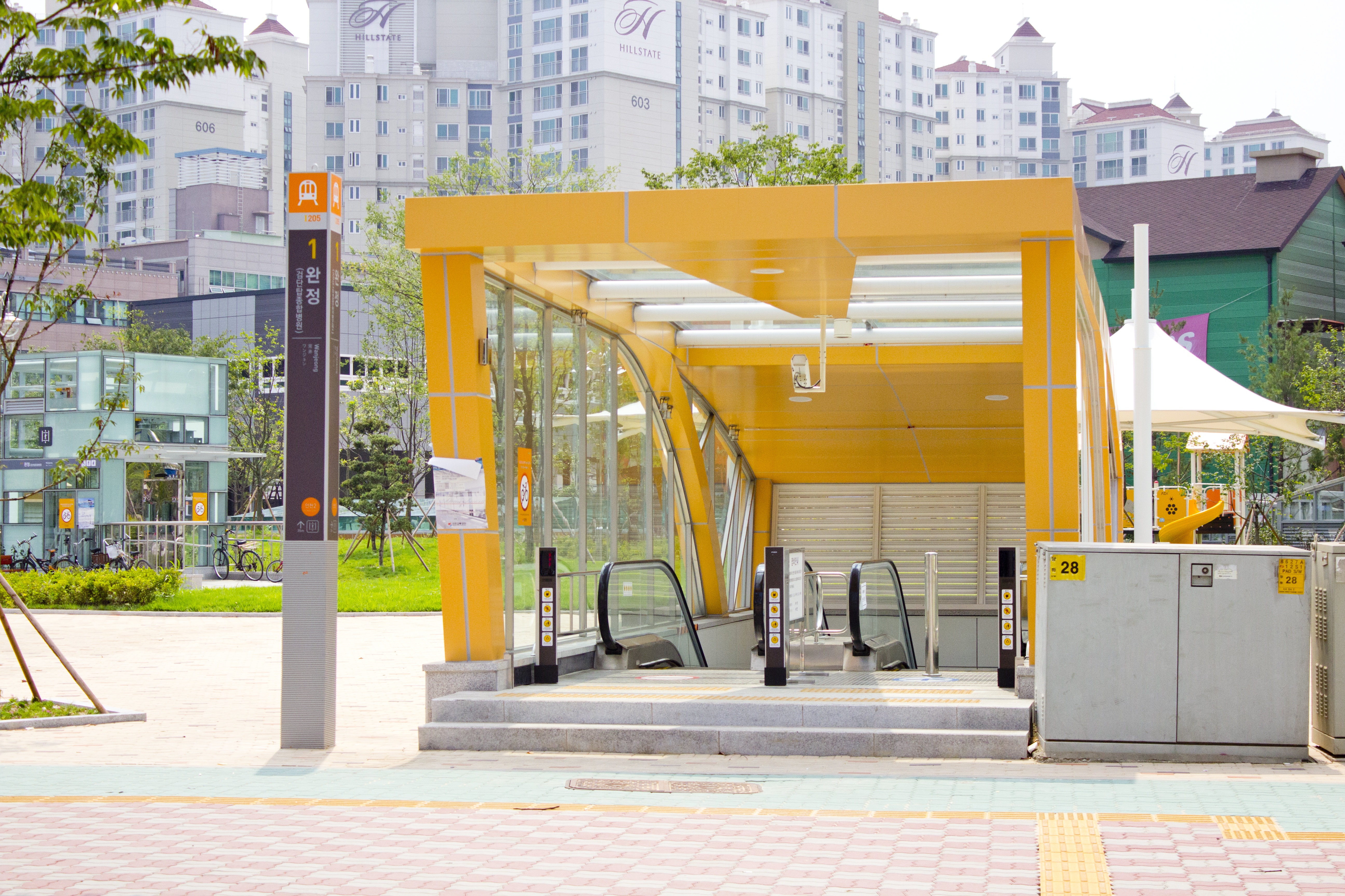 인천2호선 완정역 1번 출구